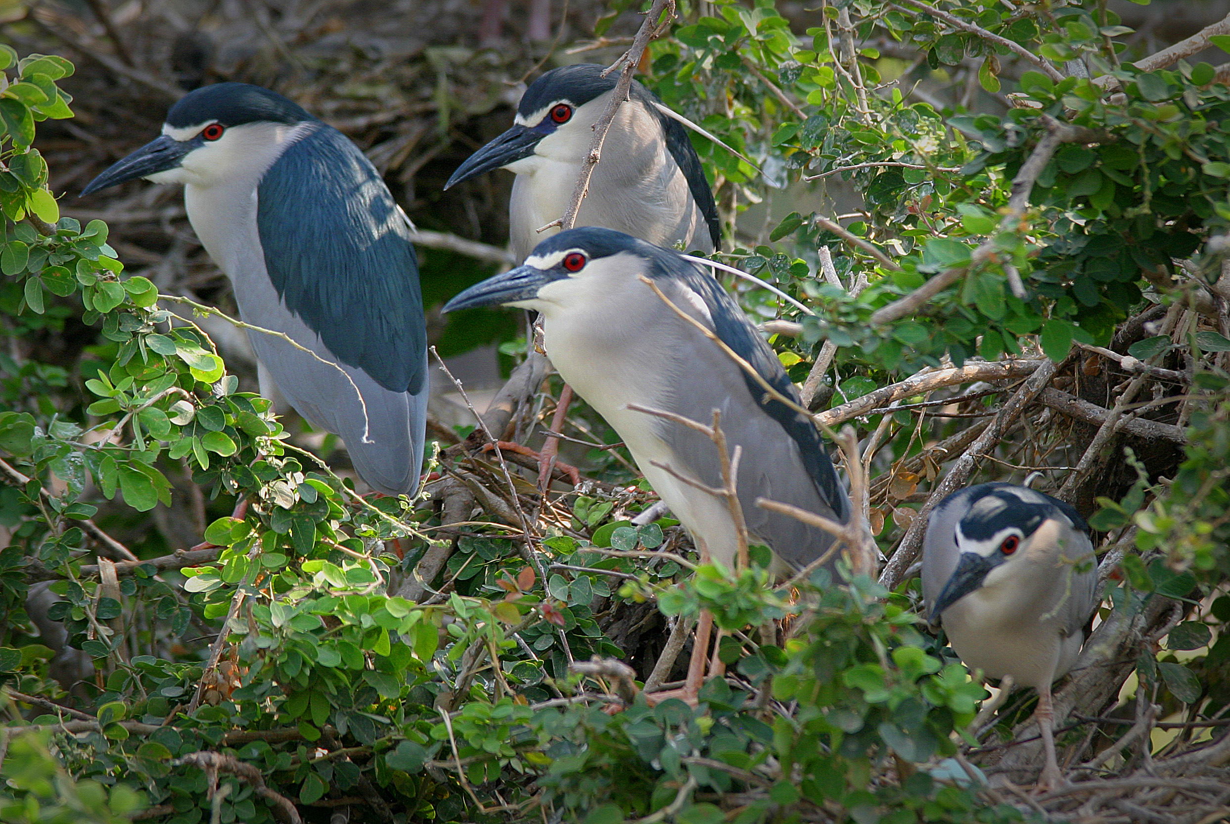 Таиланд